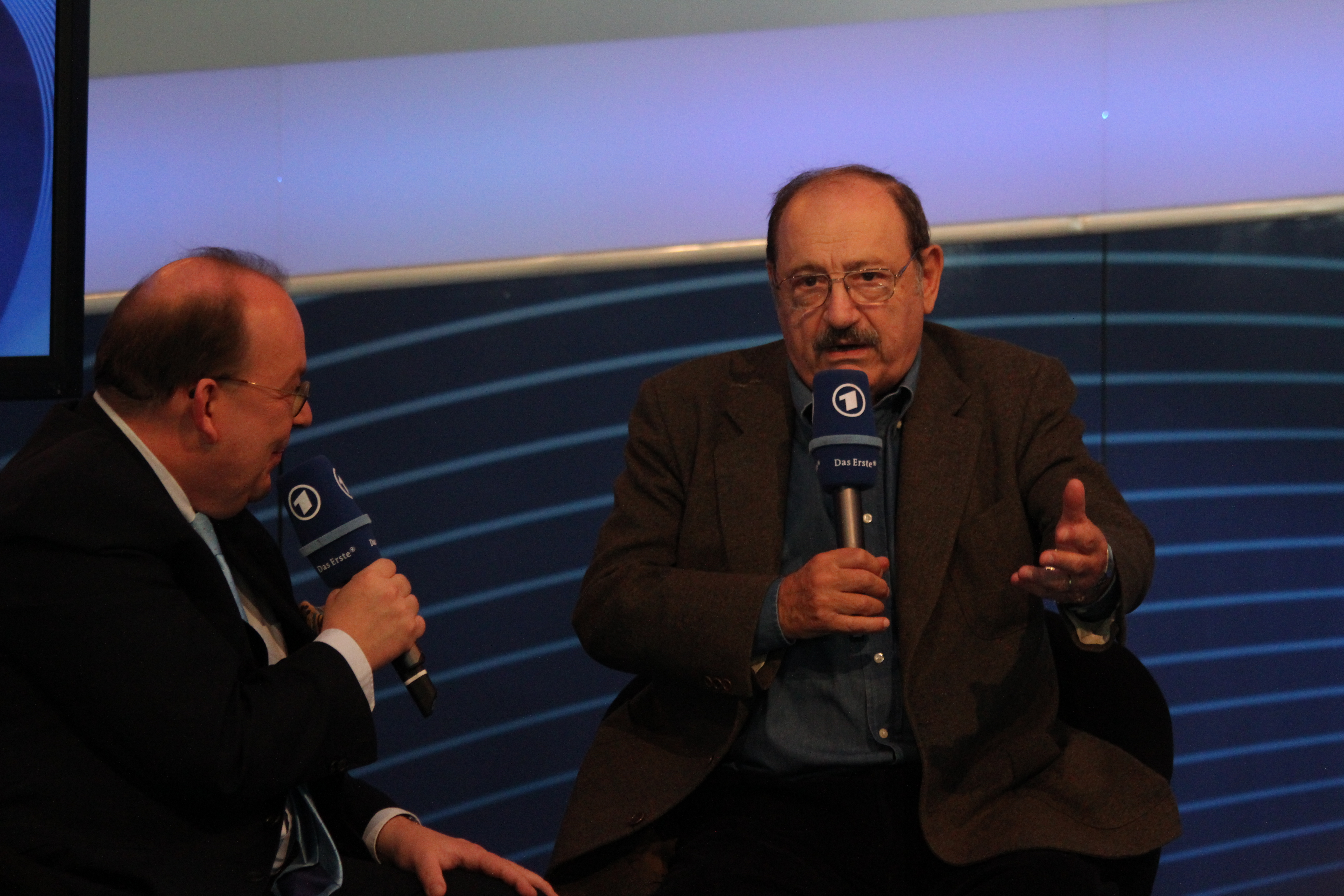 Denis Scheck und Umberto Eco auf der Frankfurter Buchmesse 2011